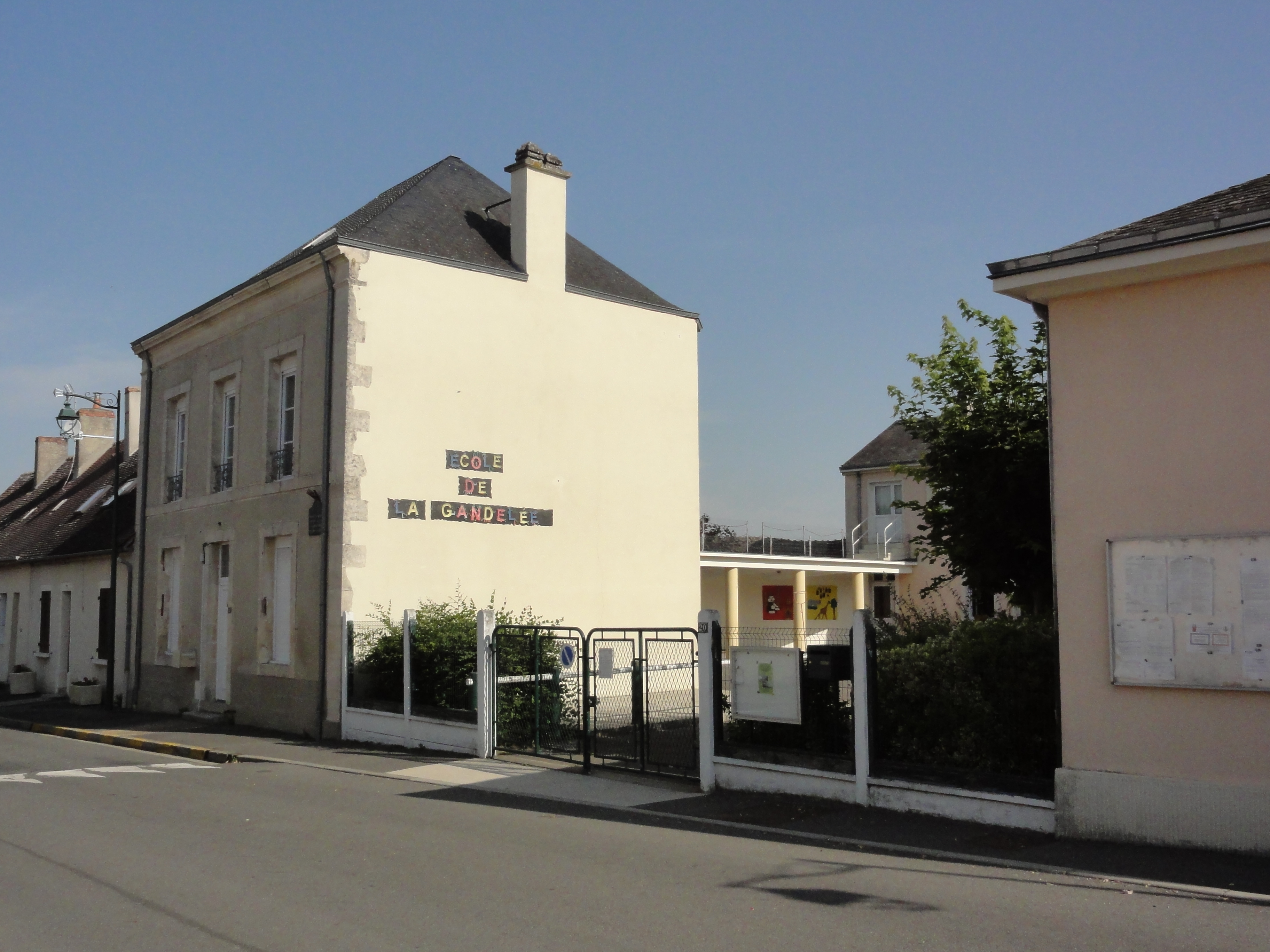 Dangeul (Sarthe) école